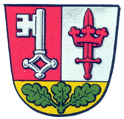 Wappen Offenbach Bürgel